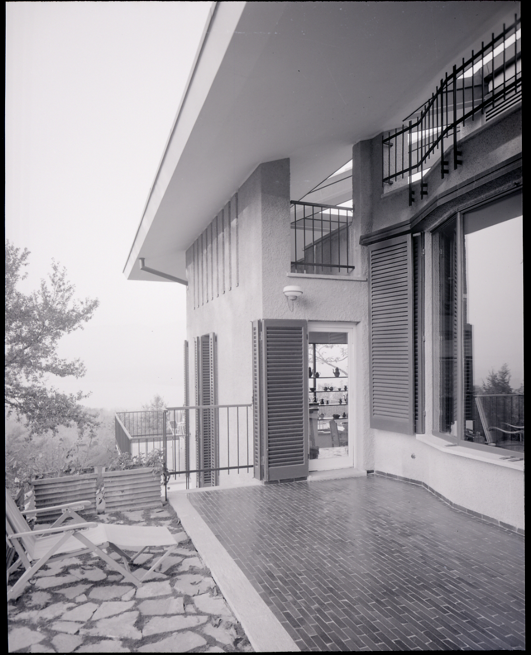 Servizio fotografico : Varese, 1963 / Paolo Monti. - Buste: 14, Fototipi: 14 : Negativo b/n, gelatina bromuro d'argento/ pellicola ; 10x12. - ((Serie costituita da 14 negativi identificati con i nn.: 7558-7570, 7578bis. La suddetta serie è contenuta nella scatola identificata con la numerazione 7201-7600G. - Fonte: Rubrica di Paolo Monti: Archivio fino 1-4-1961/ 31-3-1963 (1961-1963), presso Archivio Paolo Monti. - Fonte: Agenda di Paolo Monti: R 1 - Monti/ 1 aprile 1963 - 6 giugno 1964/ 6000-8193 (1963-1964), presso Archivio Paolo Monti